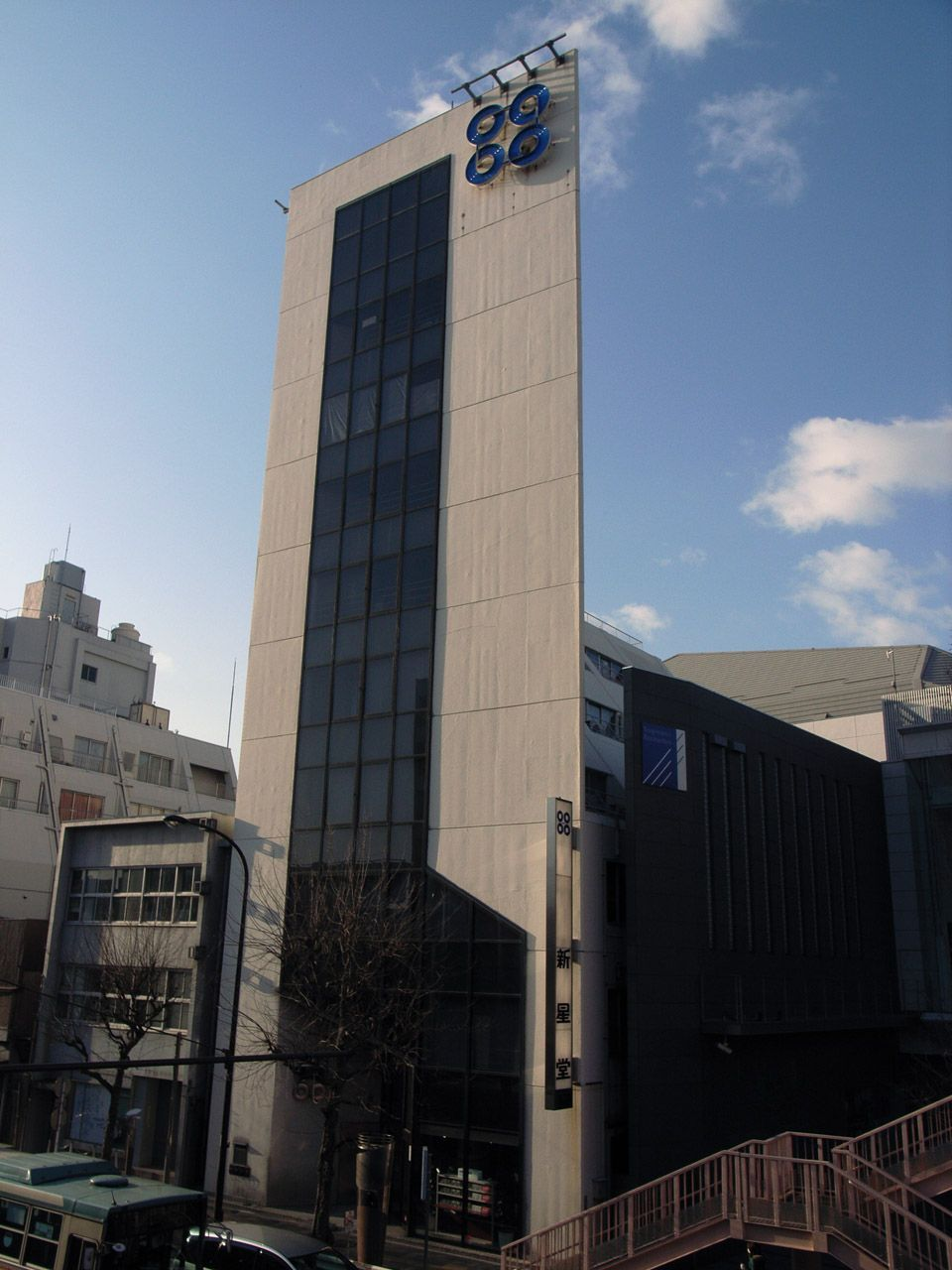 Shinseido Headquaters, Suginami-ku, Tokyo, Japan / 新星堂本社（東京都杉並区）